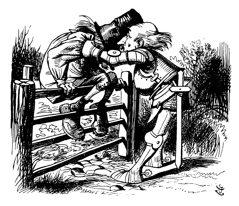 гравюра Джона Тенниела